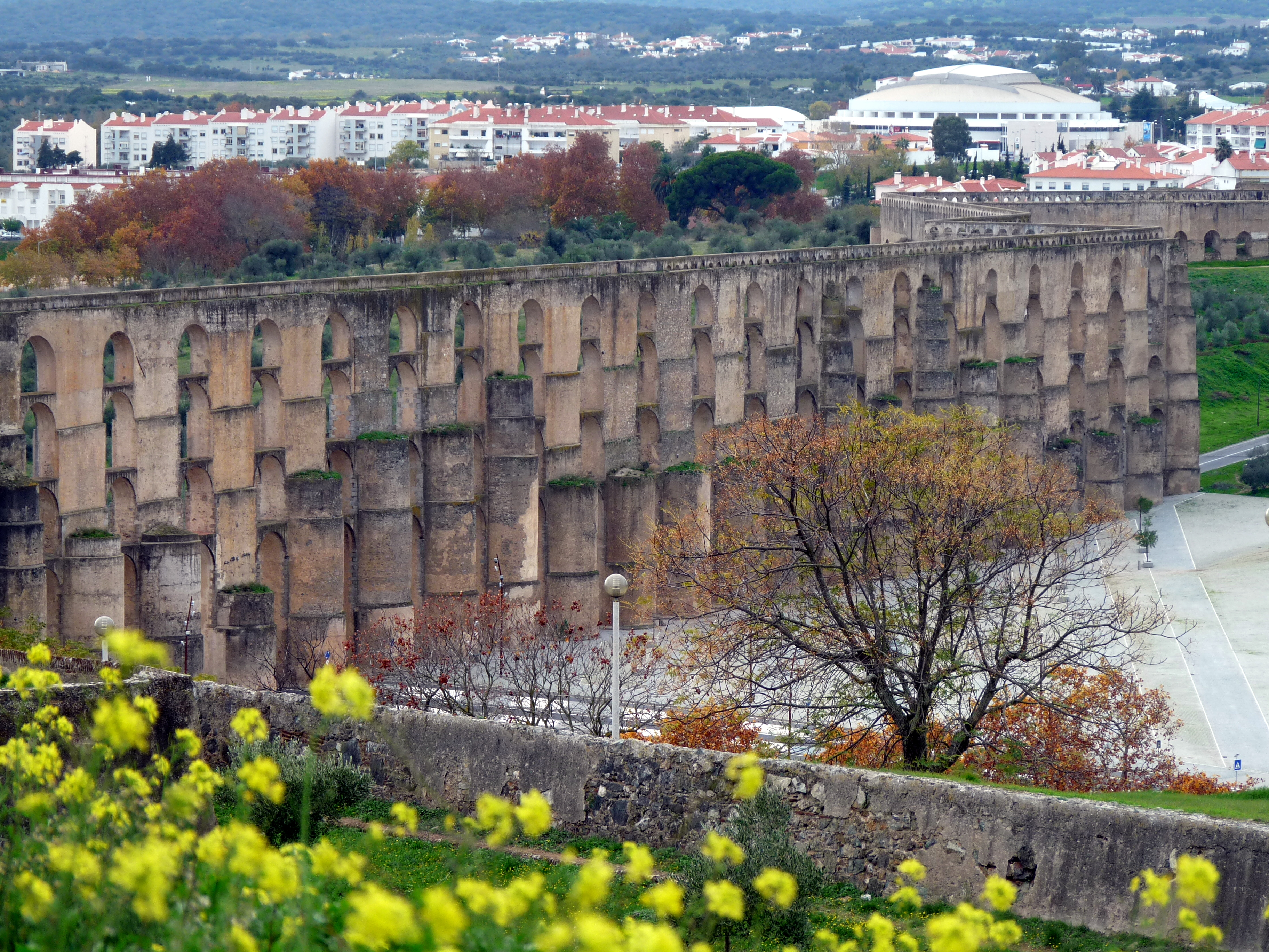 Elvas - Aqueduto da Amoreira. Ao fundo, o Coliseu José Rondão Almeida.